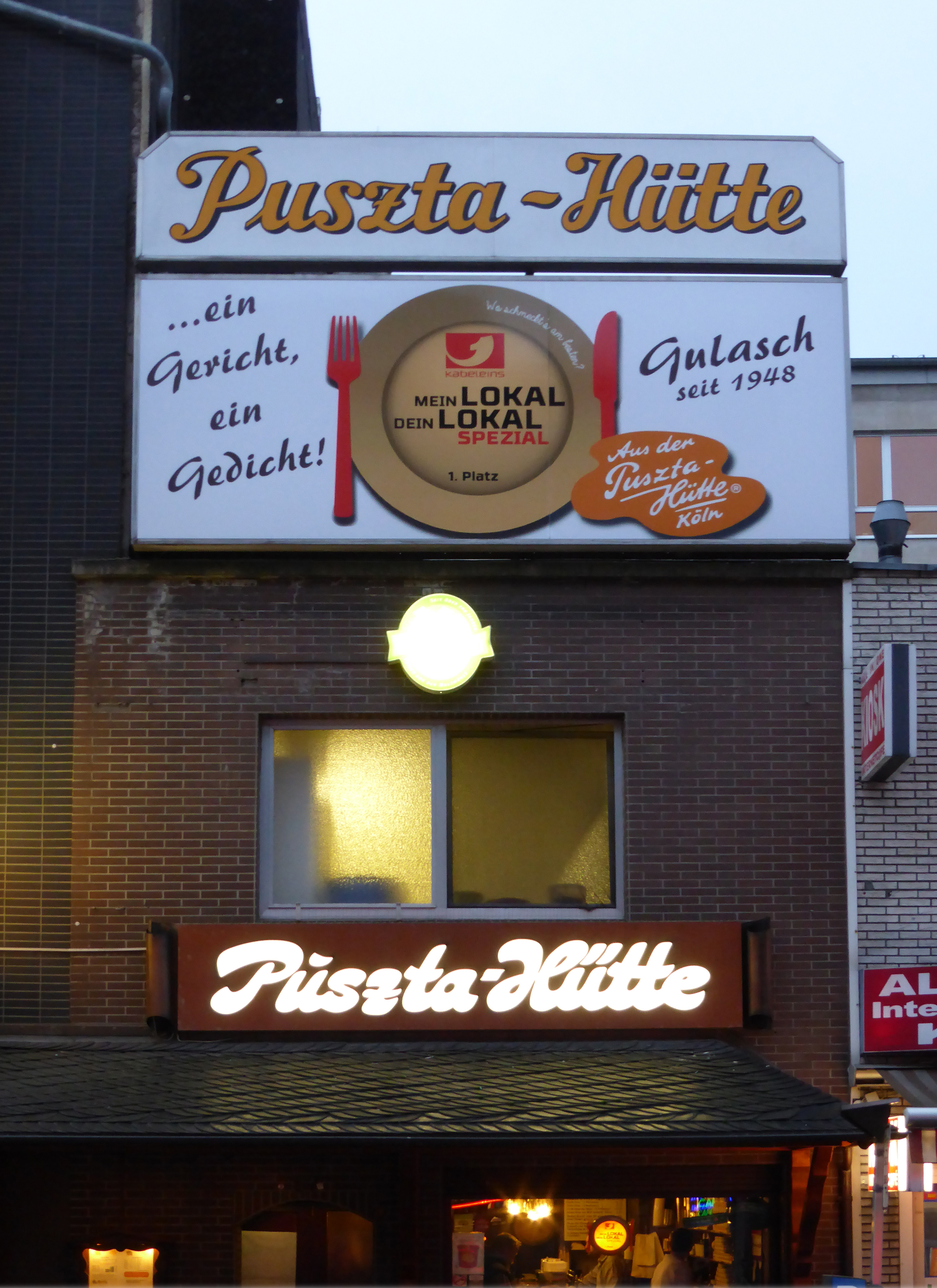 Fassade der Puszta-Hütte 2015.